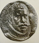 Bild von Johannes Pistorius